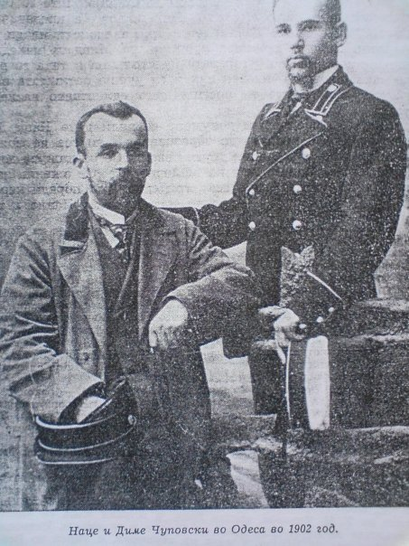 Наце Д. Димов